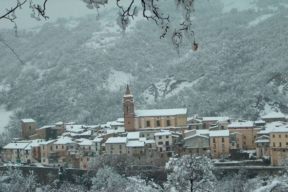 Bisenti in de sneeuw vanuit het zuiden.